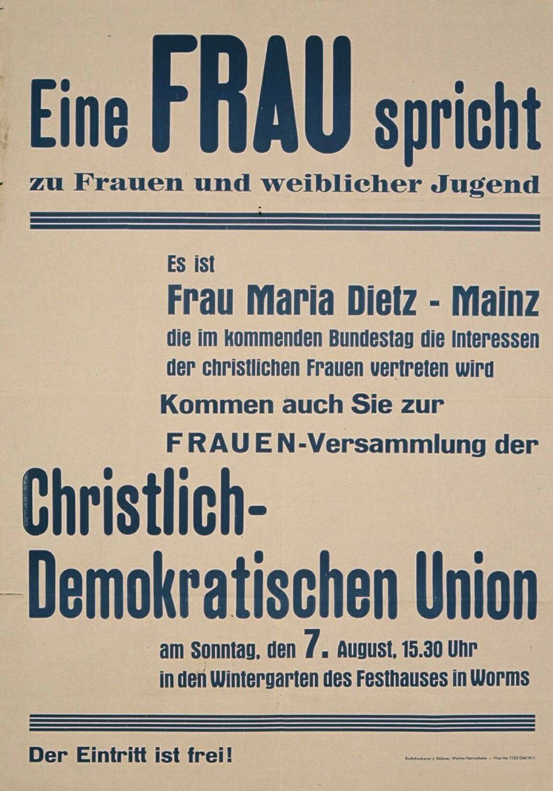 Eine Frau spricht zu Frauen und weiblicher Jugend Es ist Frau Maria Dietz ... Kommen auch Sie zur Frauen-Versammlung der CDU ...Plakatart:AnkündigungsplakatObjekt-Signatur:10-001: 241Bestand:Plakate zu Bundestagswahlen (10-001)GliederungBestand10-18:Plakate zu Bundestagswahlen (10-001) » Die 1. Bundestagswahl am 14. August 1949 » CDU » AnkündigungsplakateLizenz:KAS/ACDP 10-001: 241 CC-BY-SA 3.0 DE